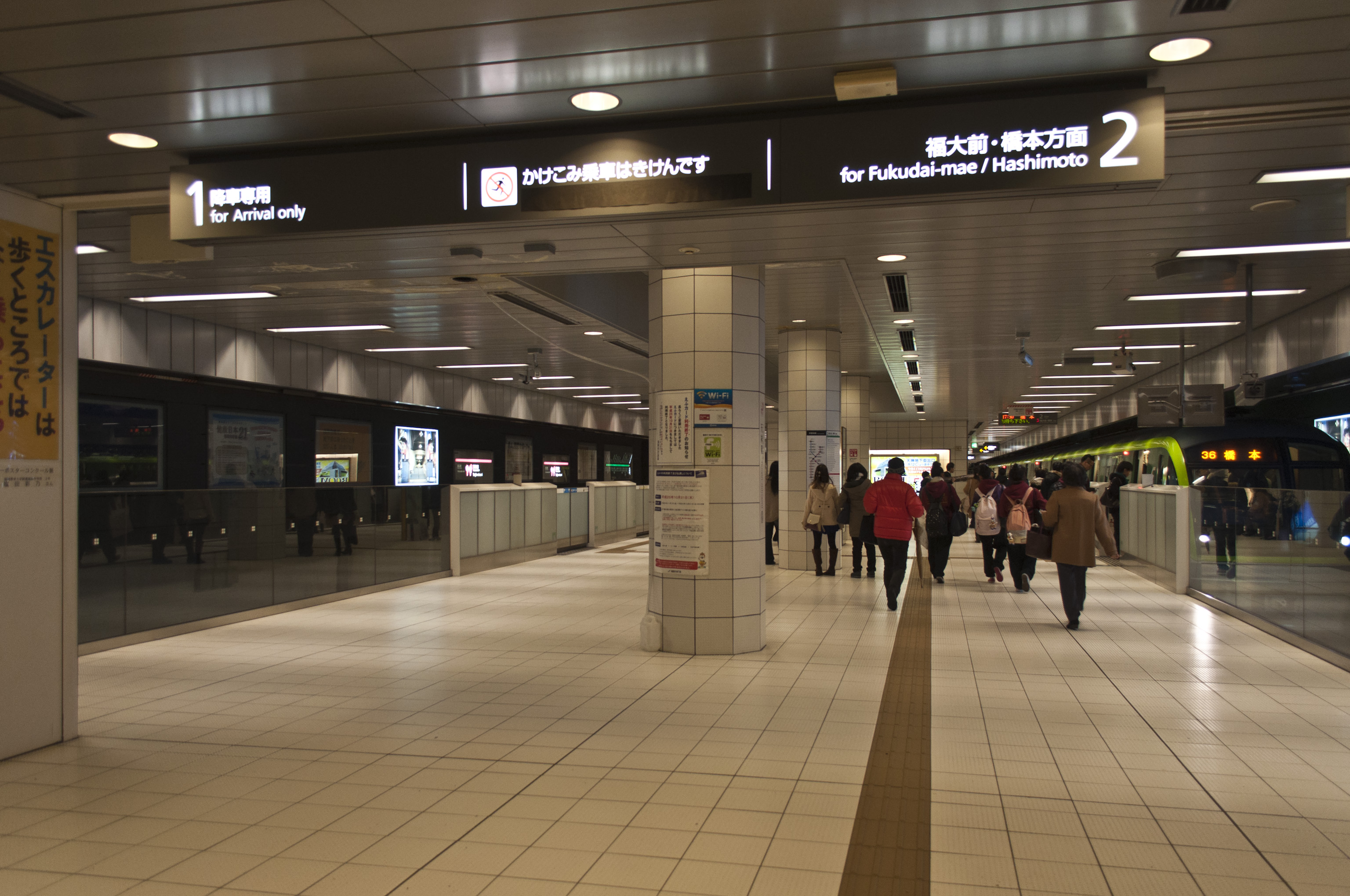 福岡市地下鉄天神南駅のプラットフォーム。より明瞭な画像差し替える可能性あり